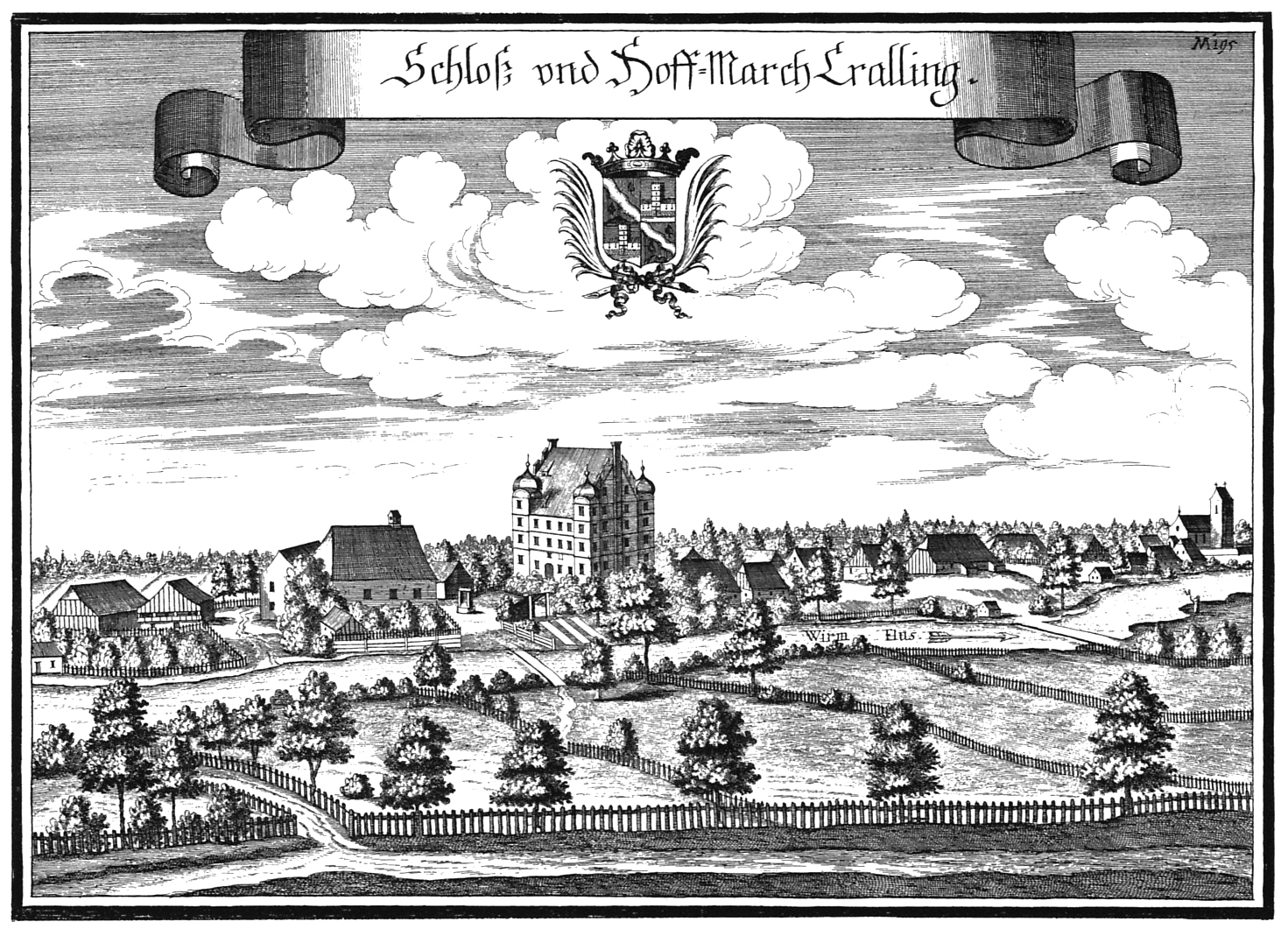 Hofmarkschloss Krailling, errichtet zwischen 1534 und 1560, 1813 abgebrochen. Kupferstich von Michael Wening um 1700.